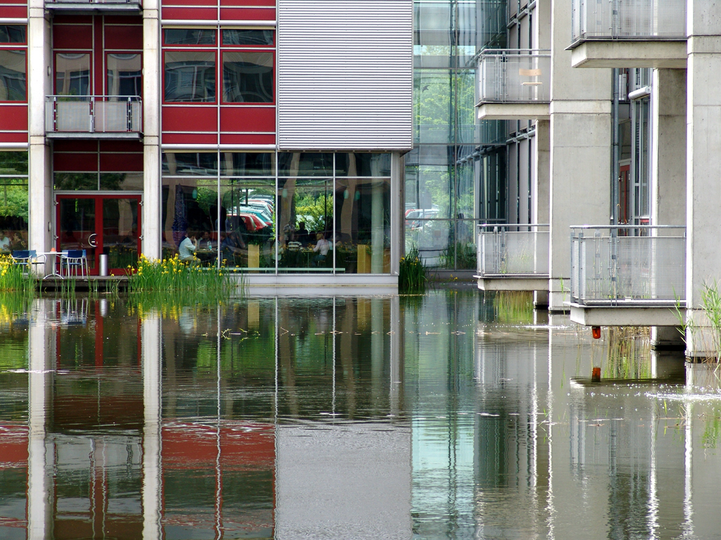 Außenansicht des Gebäudes der EBZ Business School - University of Applied Sciences, Bochum